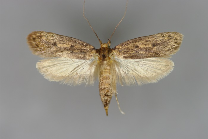 Hofmannophila pseudospretella